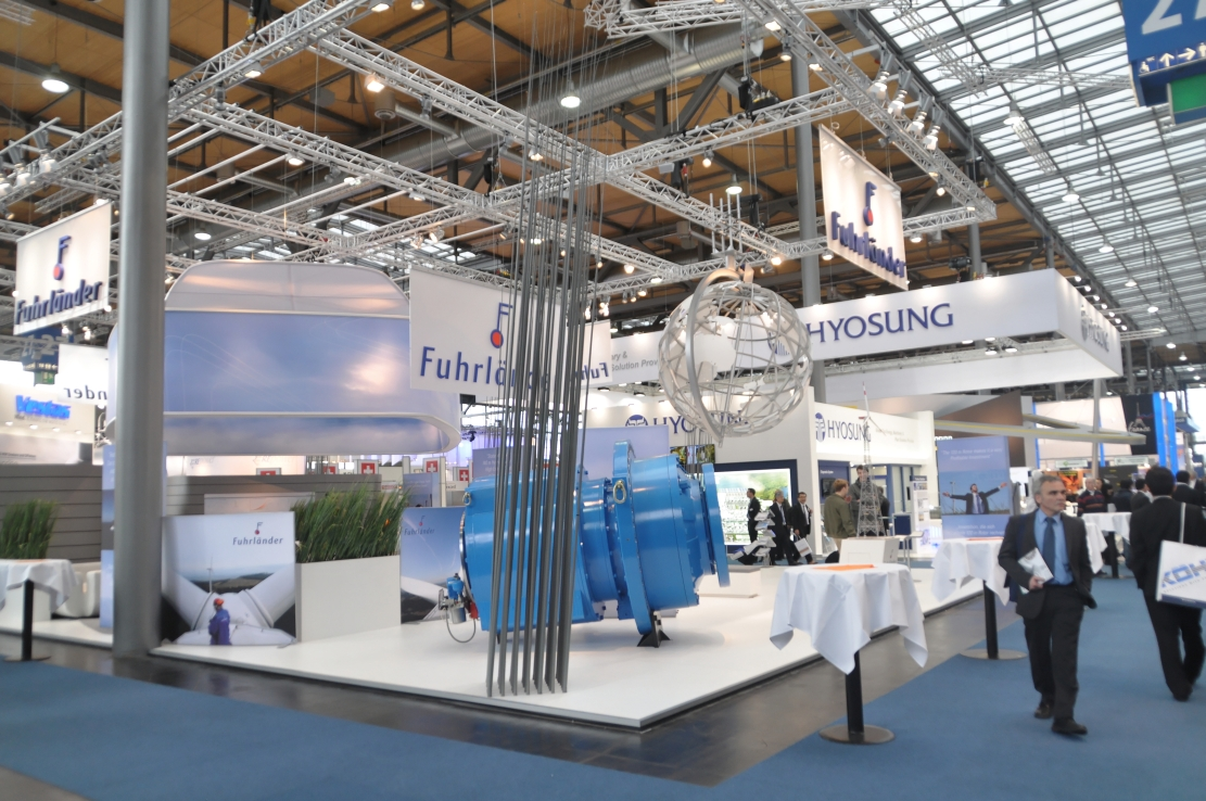 Hannover-Messe April 2012 Dieses Foto entstand durch die Mithilfe des gemeinnützigen Vereins Skillshare bei der Akkreditierung als Fotograf. Infos unter skillshare.eu Skillshare e.V. ist ein eingetragener gemeinnütziger Verein zur Förderung der Bildung durch Unterstützung der Erstellung, Sammlung und Verbreitung so genannten freien Wissens. IBAN: DE16 8306 5408 0004 8850 66 BIC: GENODEF1SLR Bank: VR-Bank Altenburger Land